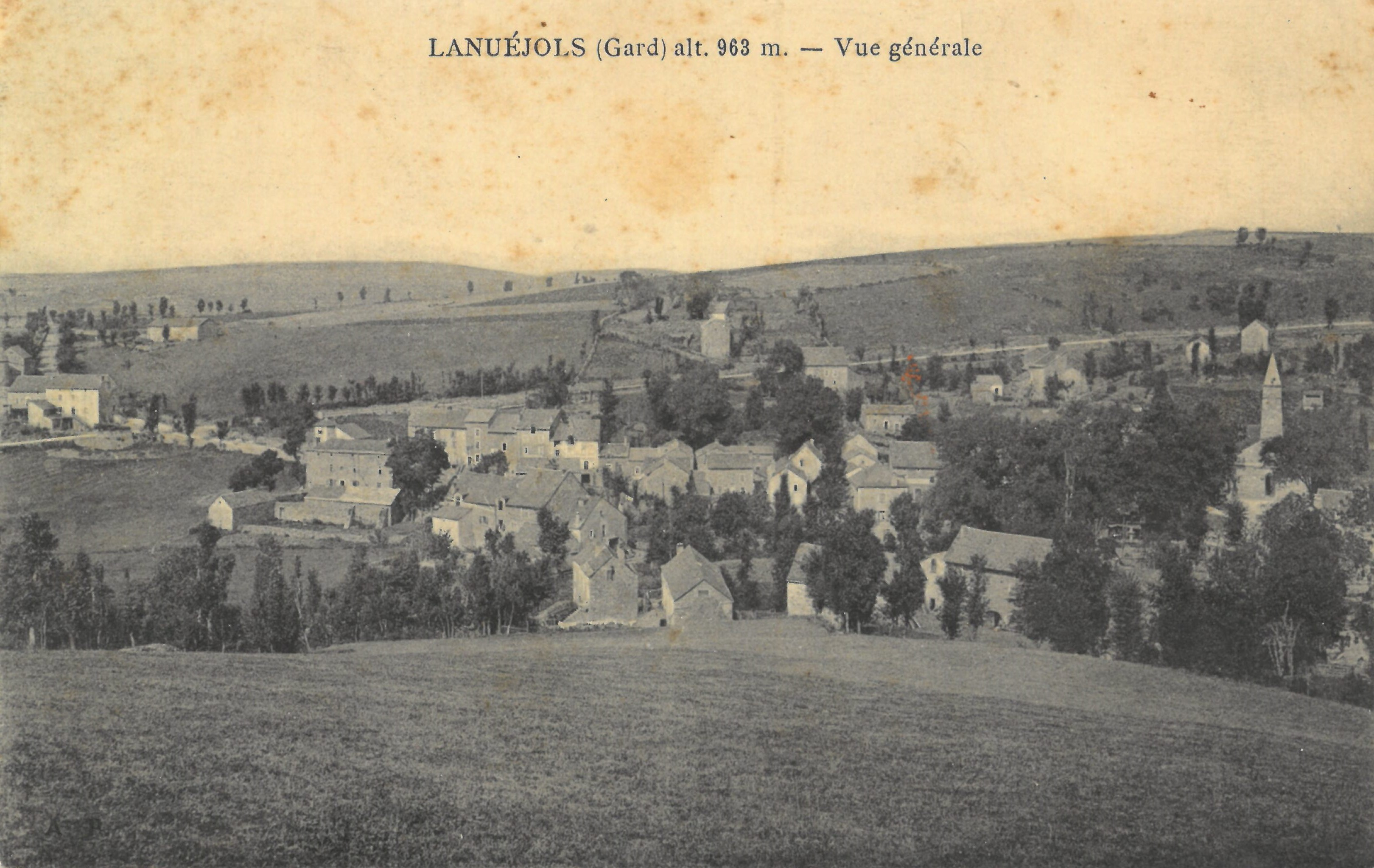 Lanuéjols : Vue générale. Carte postale ancienne.